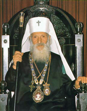 Le patriarche Pavle (Paul de Belgrade) est l'actuel primat de l'Eglise orthodoxe serbe